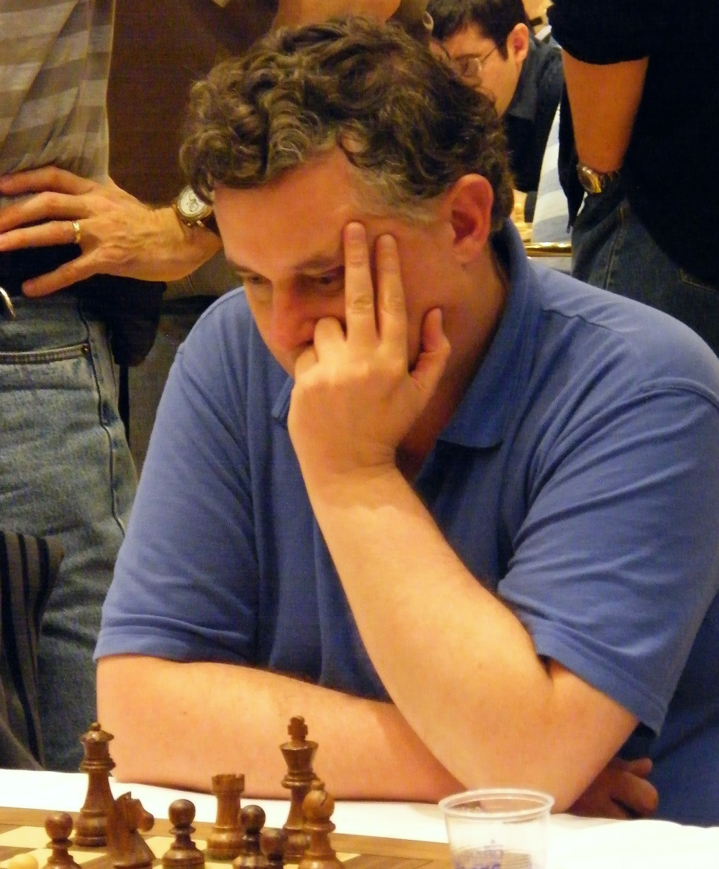 Russell John Dive bei der 38. Schacholympiade in Dresden 2008